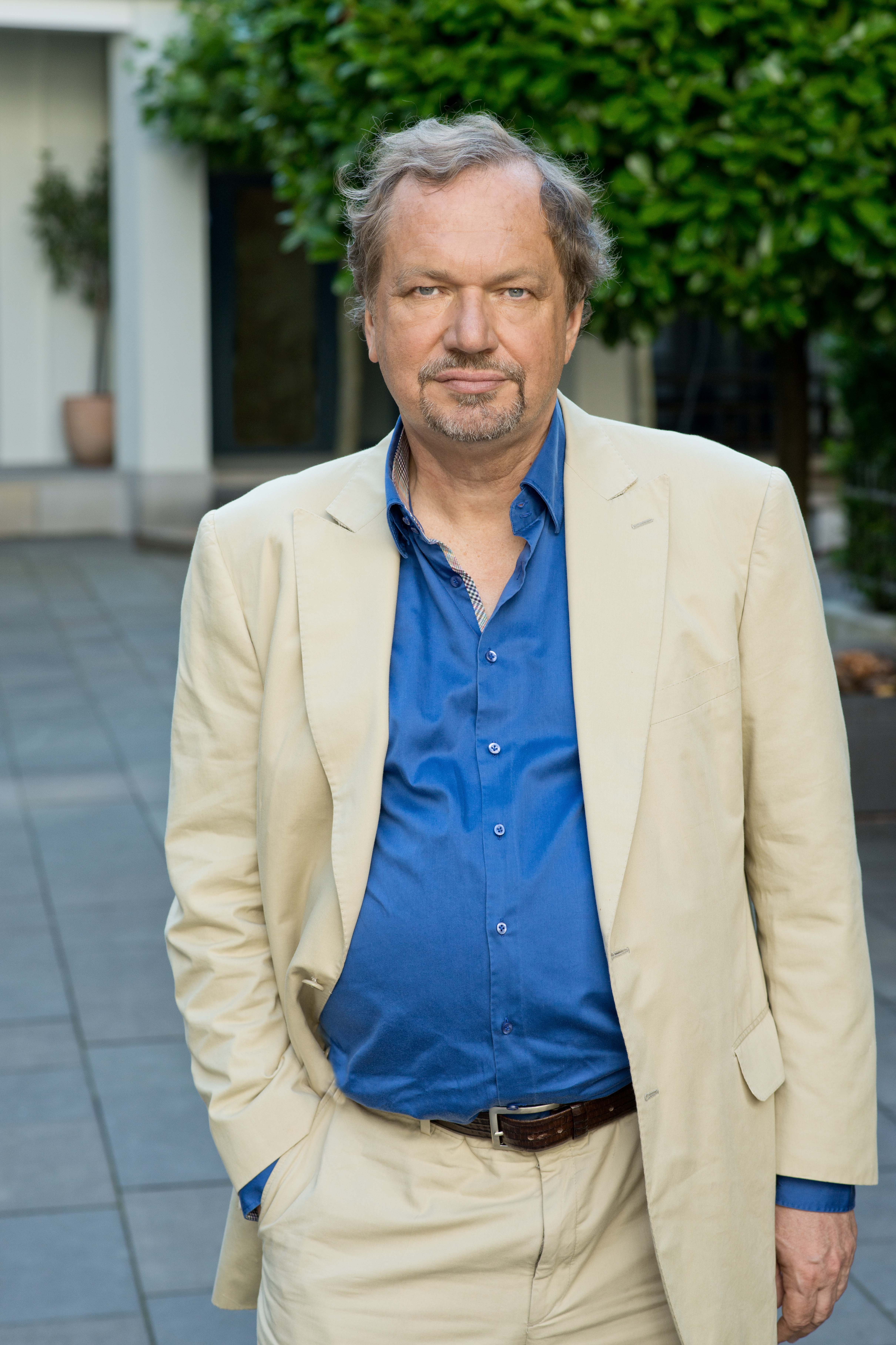 Jens Michow ,2014, Klaus Westermann